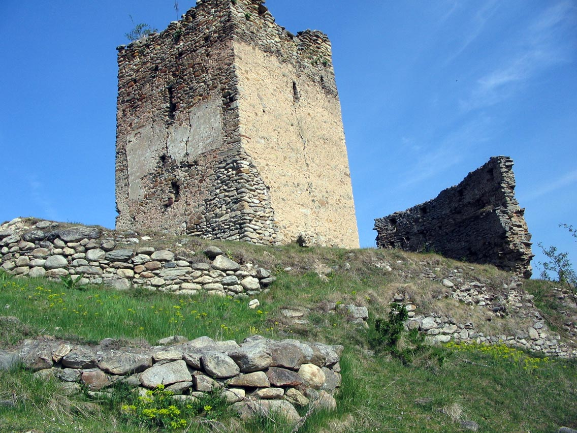 ruins of the Mălăiești castle (Hunedoara County, Romania)